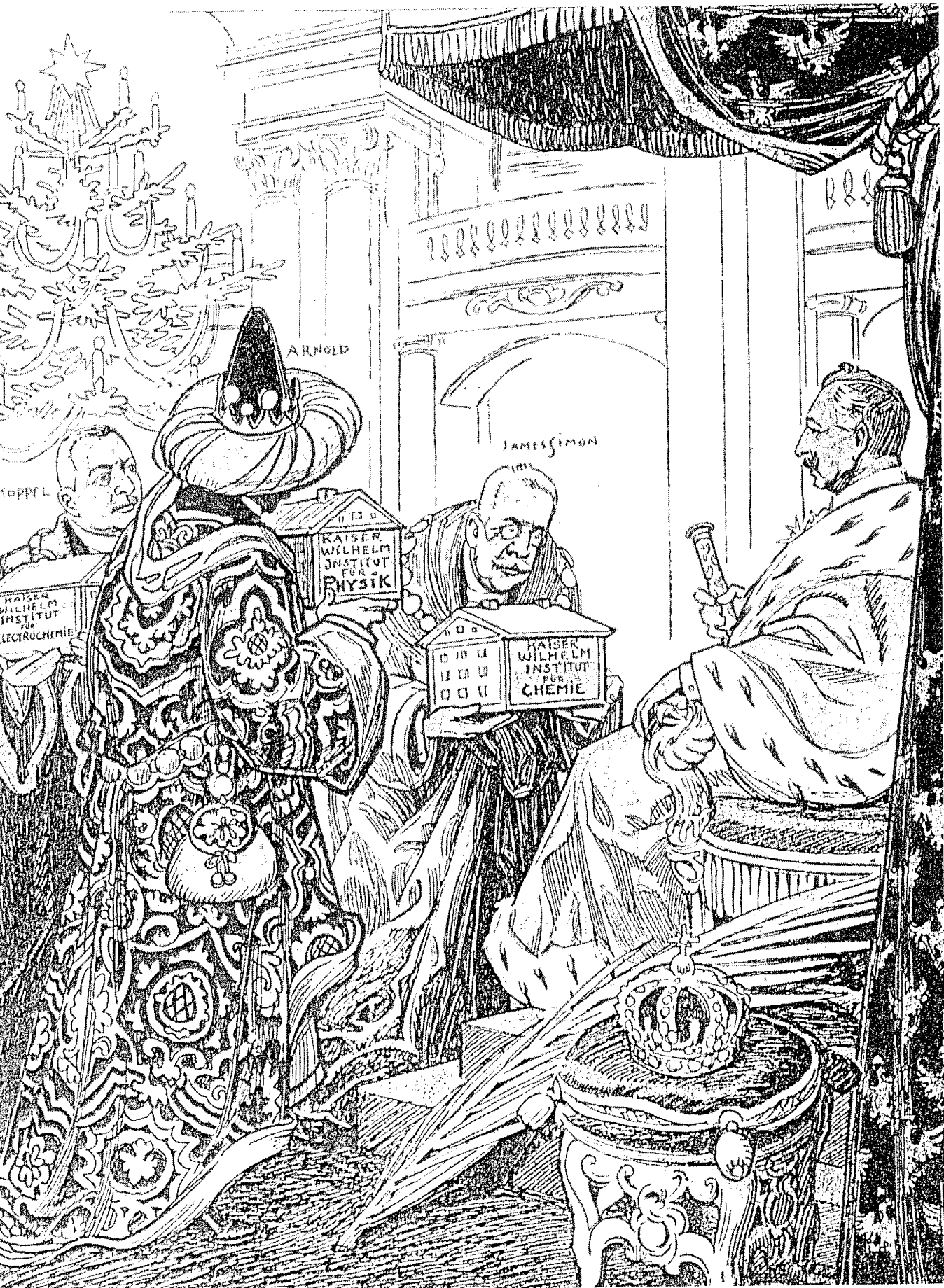 Karikatur von Kaiser Wilhelm II, mit den Spendern, die die ersten Kaiser-Wilhelm-Institute finanzieren: Leopold Koppel, Eduard Arnhold und James Simon